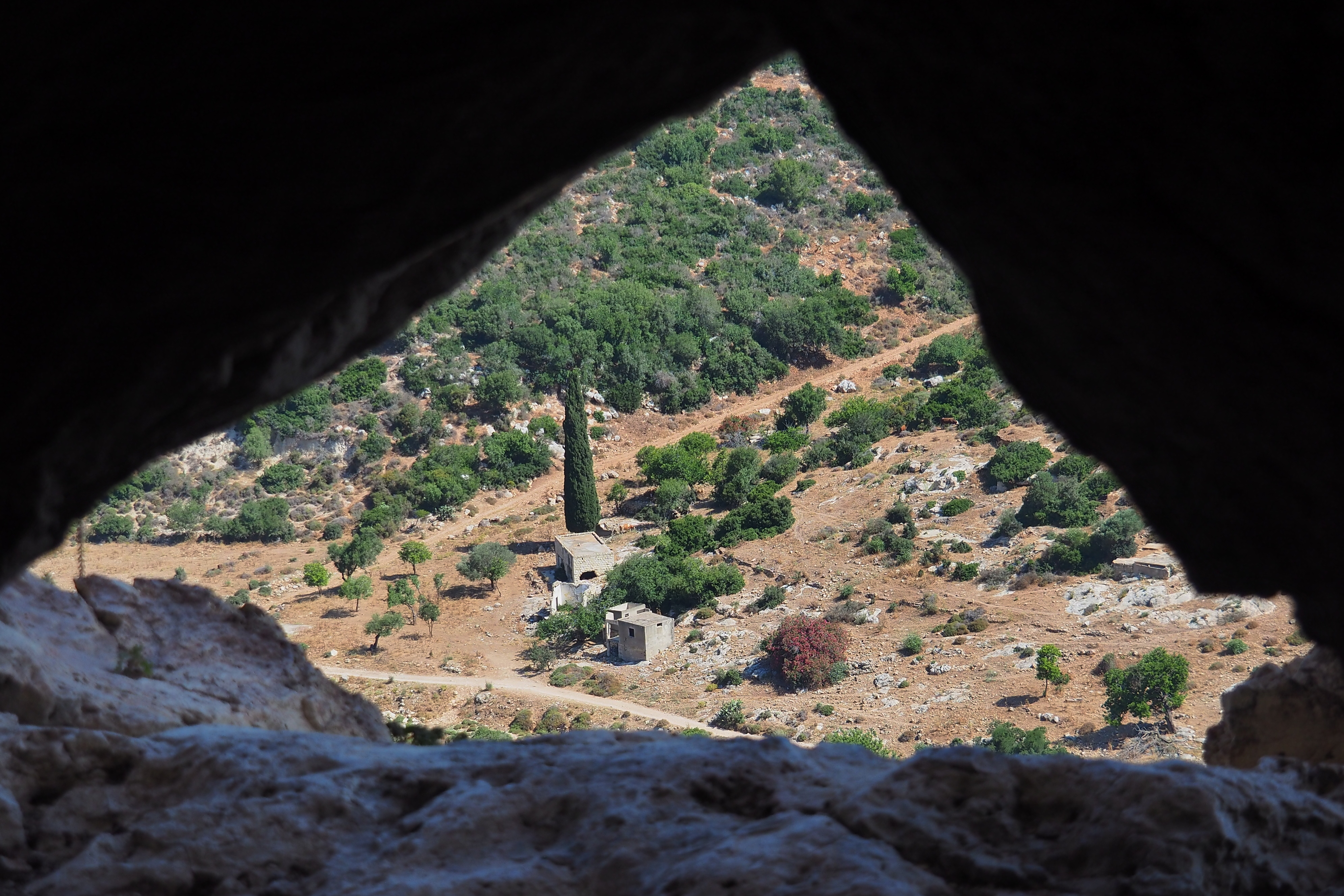 פארק הכרמל הוא כינוי לרצף של גנים לאומיים ושמורות טבע על הר הכרמל הגבוה, המשתרע מגבולותיהן הדרומיים של הערים חיפה ונשר בצפון, ועד אזור נחל מערות ועמק מהר"ל בדרום; שלושה יישובים על רכס הכרמל מהווים מובלעות בתוך רצף שטחי הפארק - עספיא, דלית אל כרמל ובית אורן. גודל הפארק המקורי היה 101,590 דונם, מתוכם 63,950 דונם שהוגדרו כ-"גן לאומי" ו-37,640 דונם הוגדרו כ"שמורת טבע". שטח השמורות משולב בתוך פארק הכרמל כאשר שטחי הגן הלאומי מקיפים את השמורות ויוצרים רצף של שטחים ירוקים.